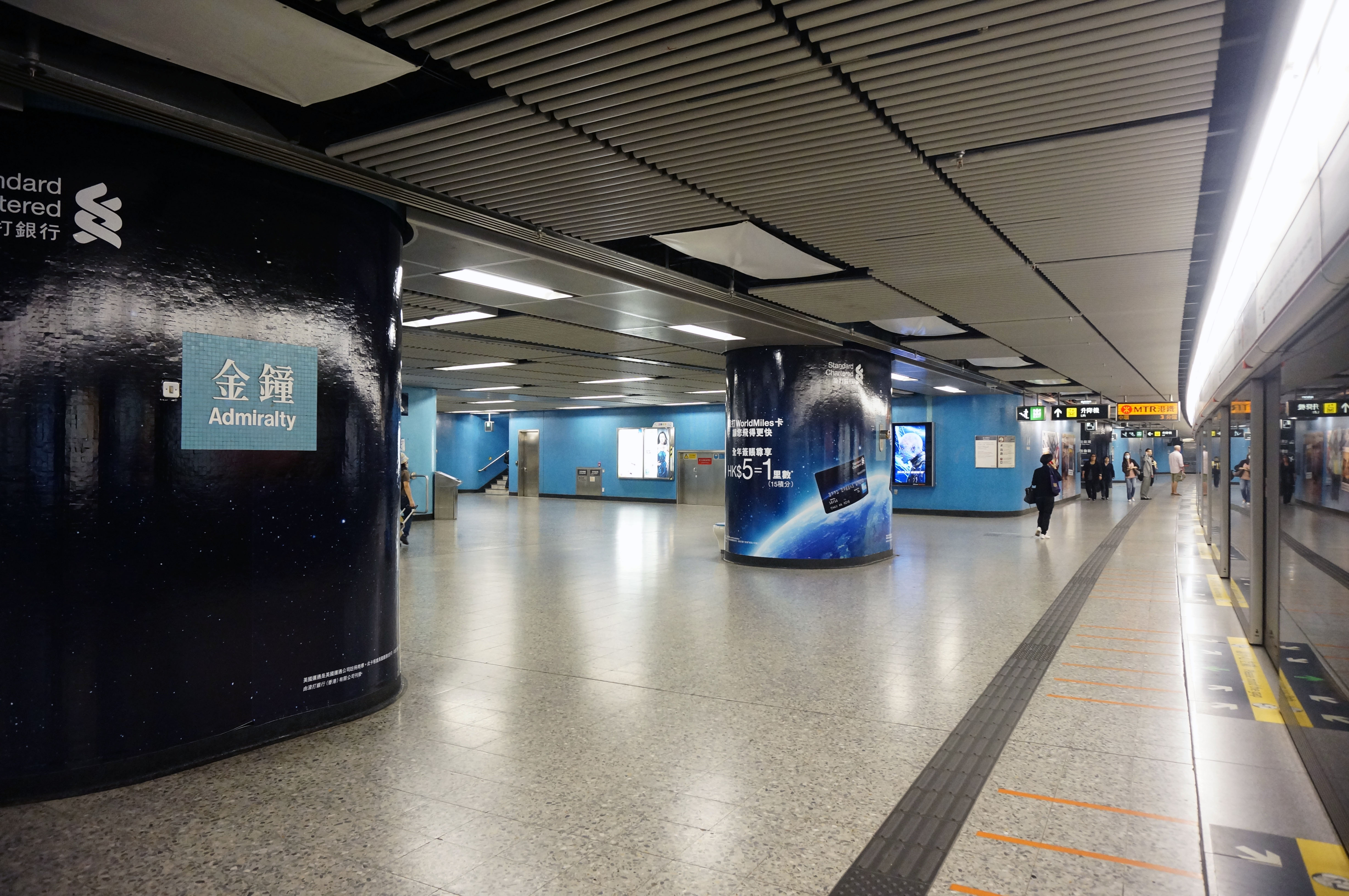 港鐵金鐘站月台